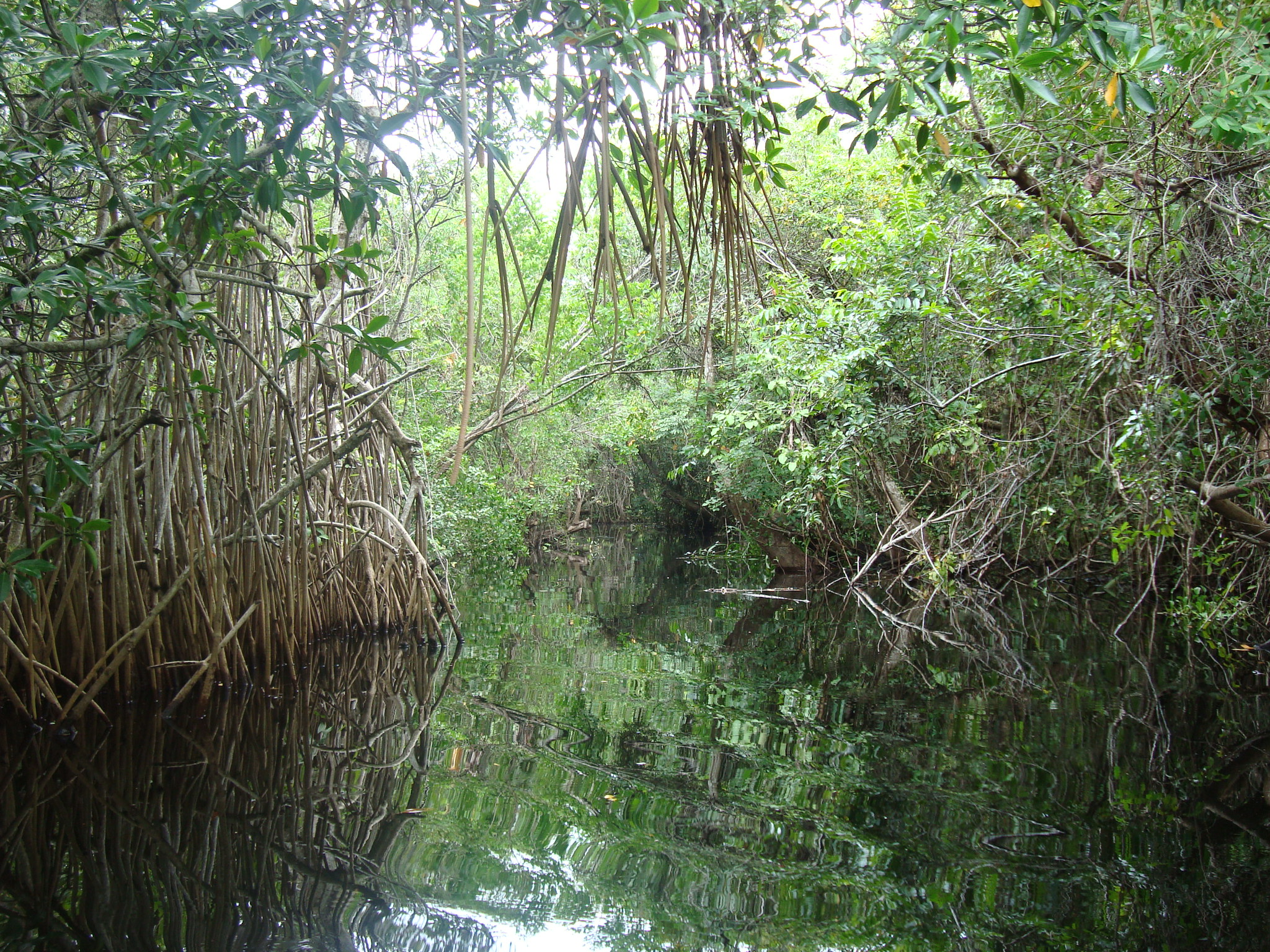 Canales en la Reserva de la Biosfera "Pantanos de Centla", municipio de Centla, Tabasco, México.